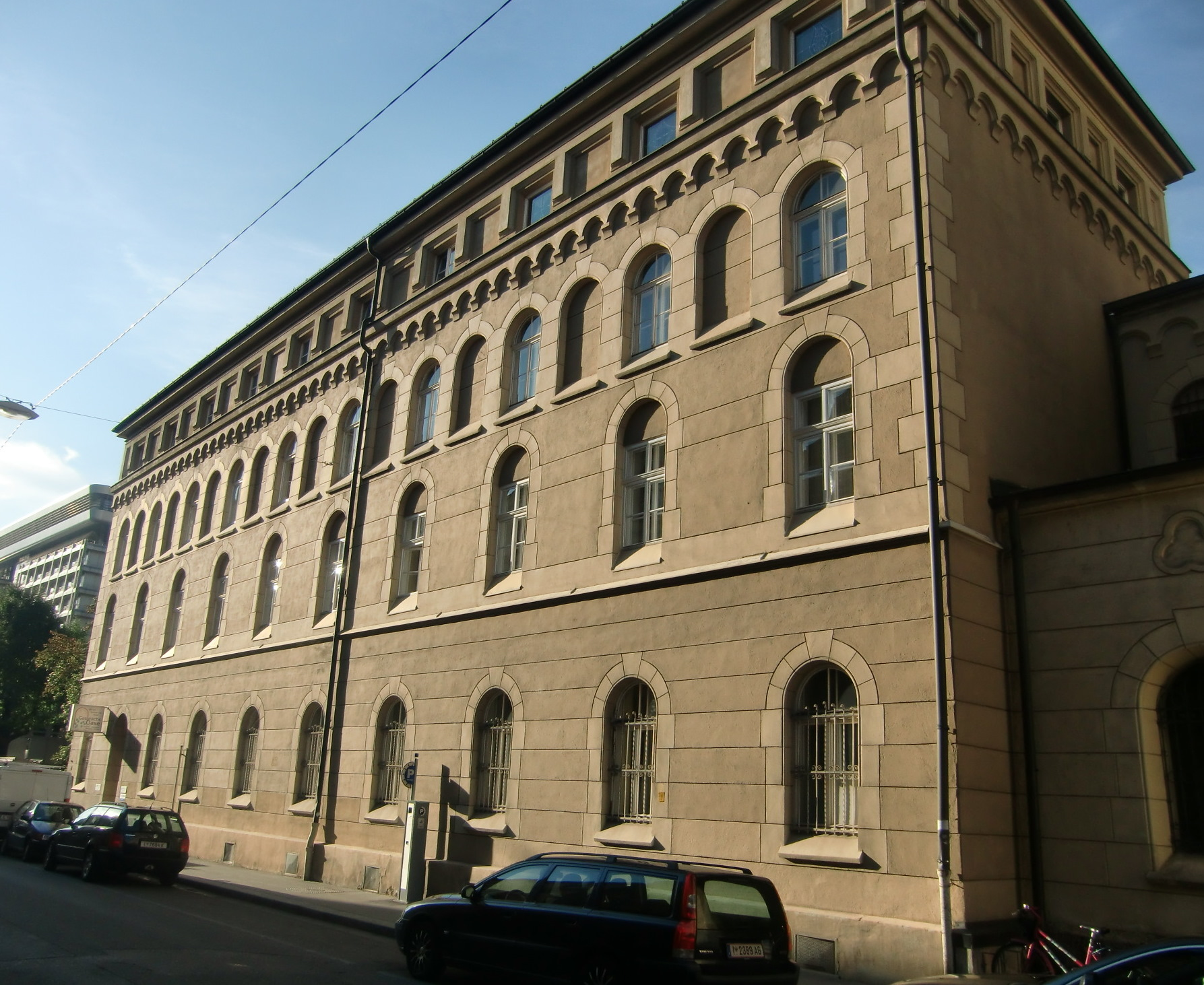 Kloster der Redemptoristen mit Einfriedung